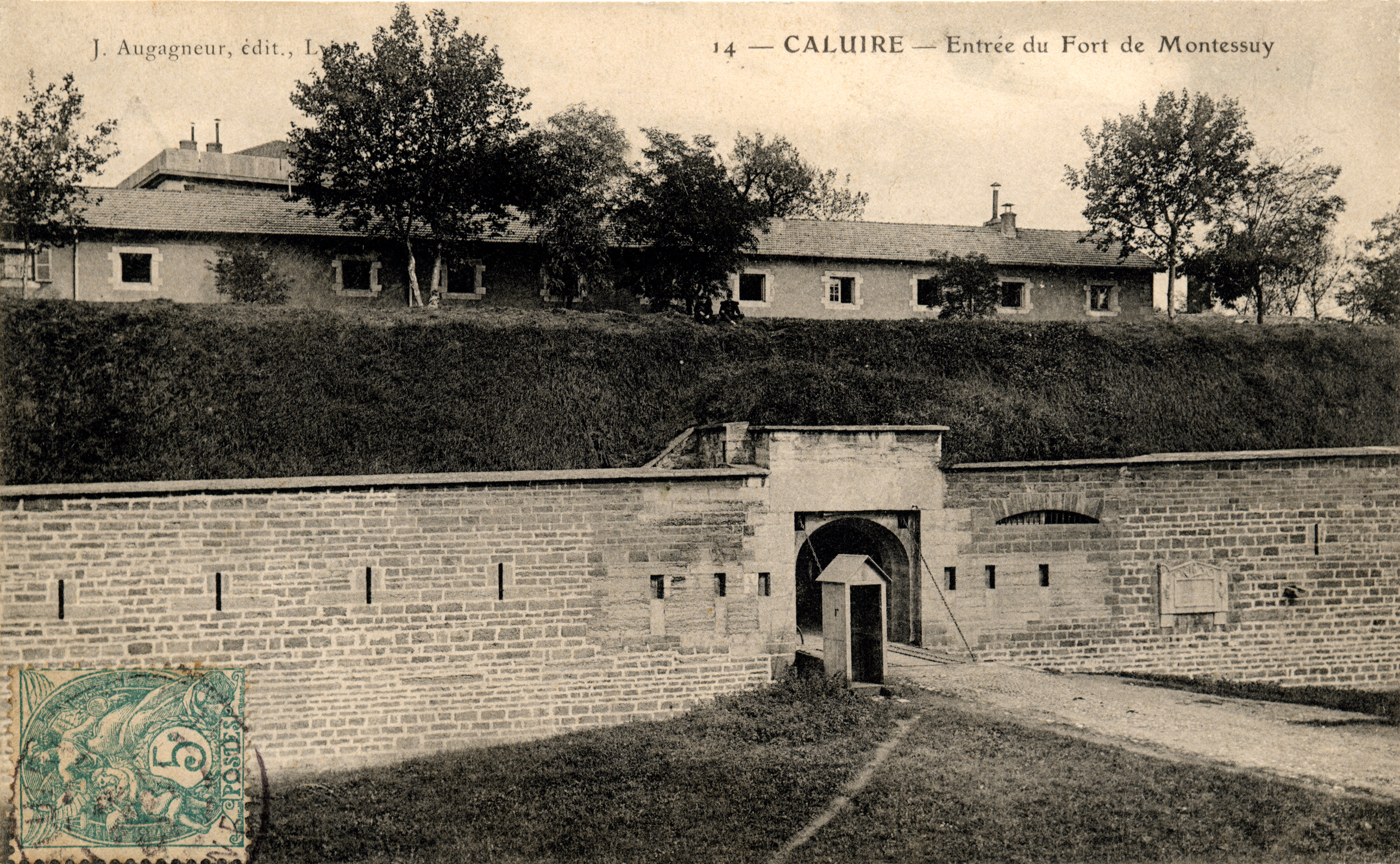 Entrée du Fort de Montessuy à Caluire-et-Cuire.